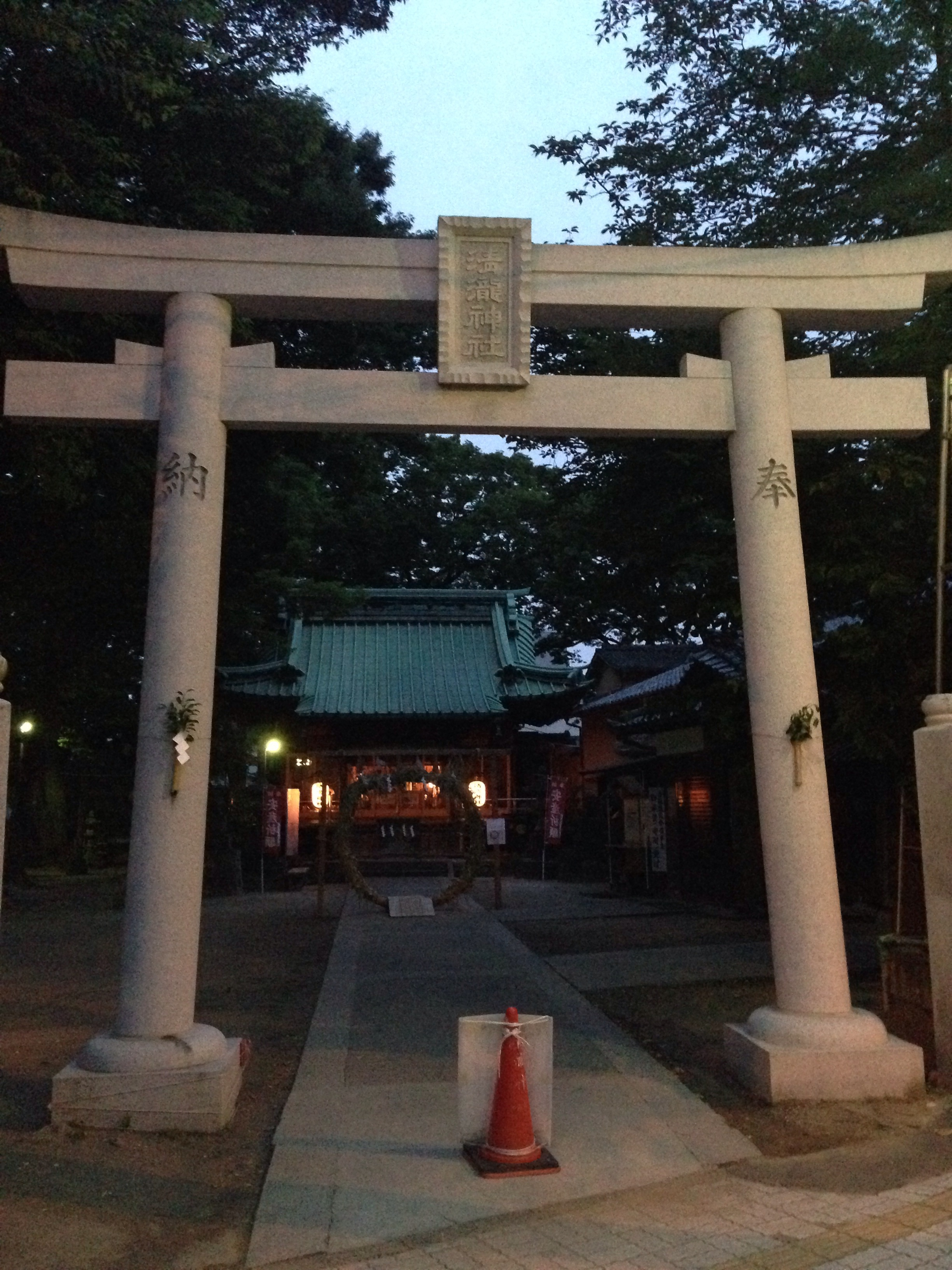 清瀧神社一之鳥居（2012年6月新造）。